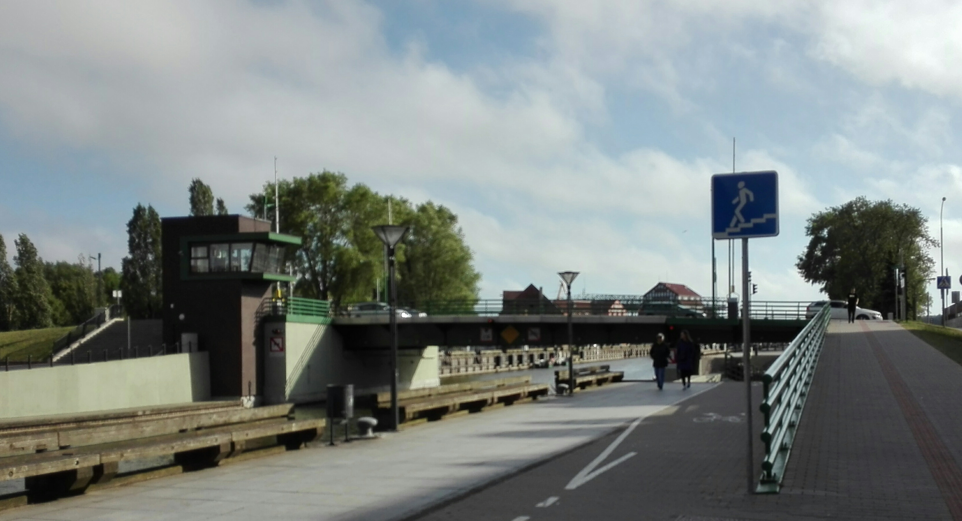 Pilies tiltas (Klaipėda)